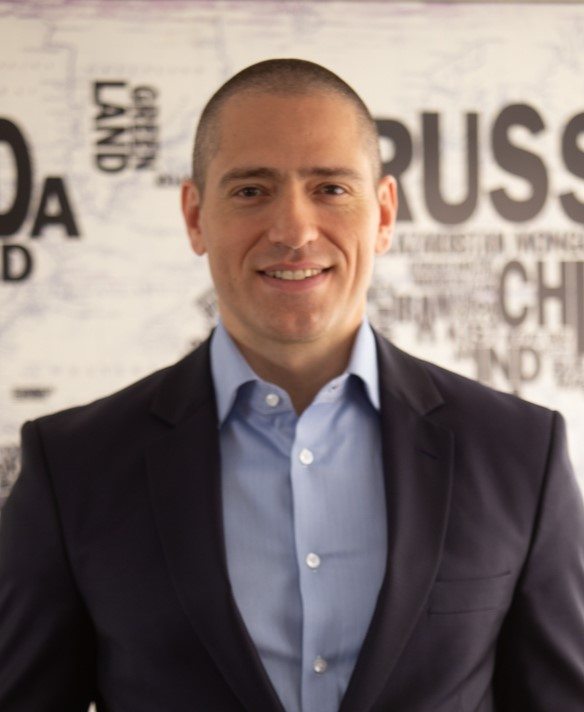 Foto de Heni Ozi Cukier